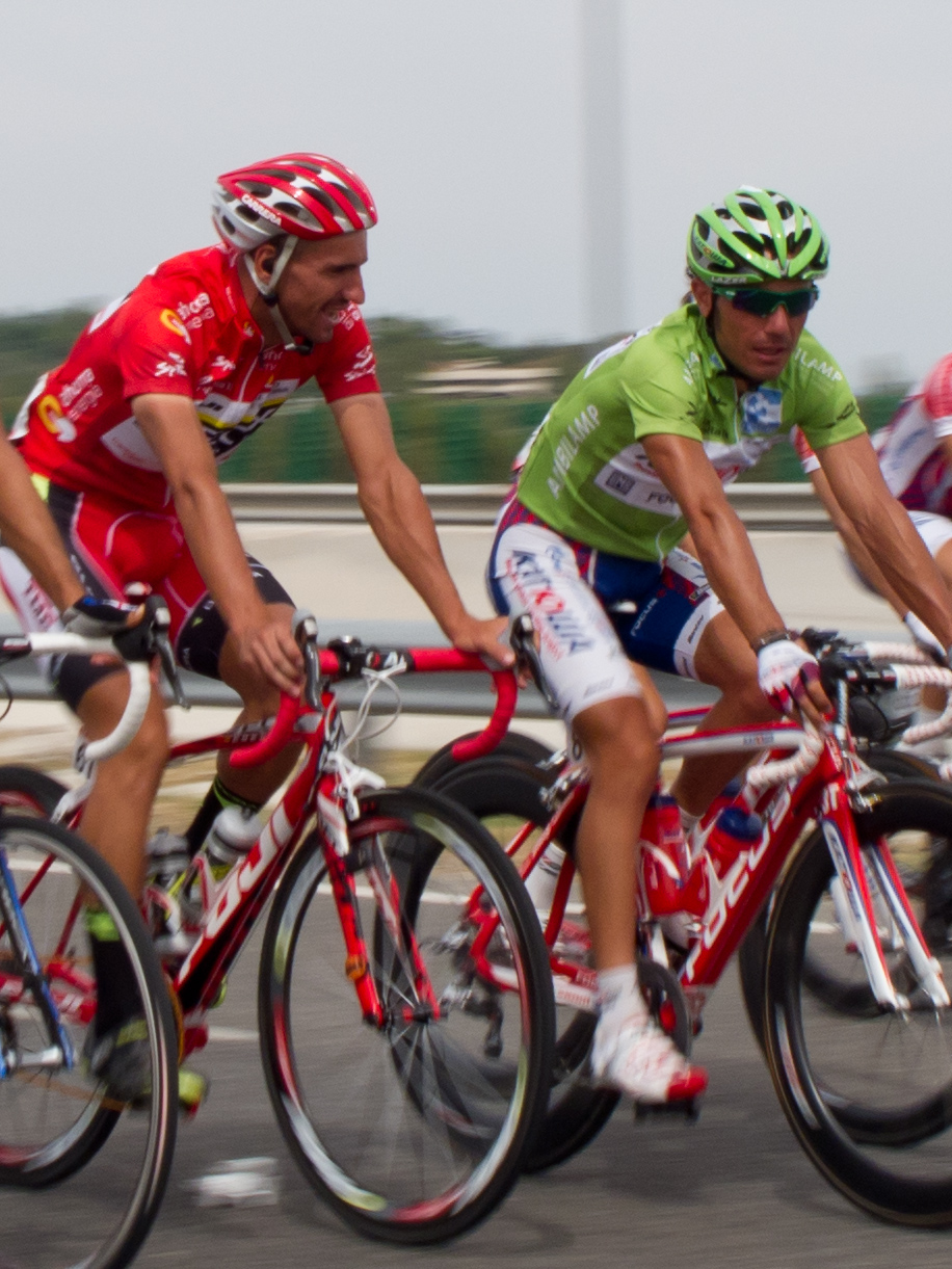 Juanjo Cobo, vestido con el maillot rojo de líder, junto a Joaquim Rodríguez, vestido con el maillot verde de la regularidad.